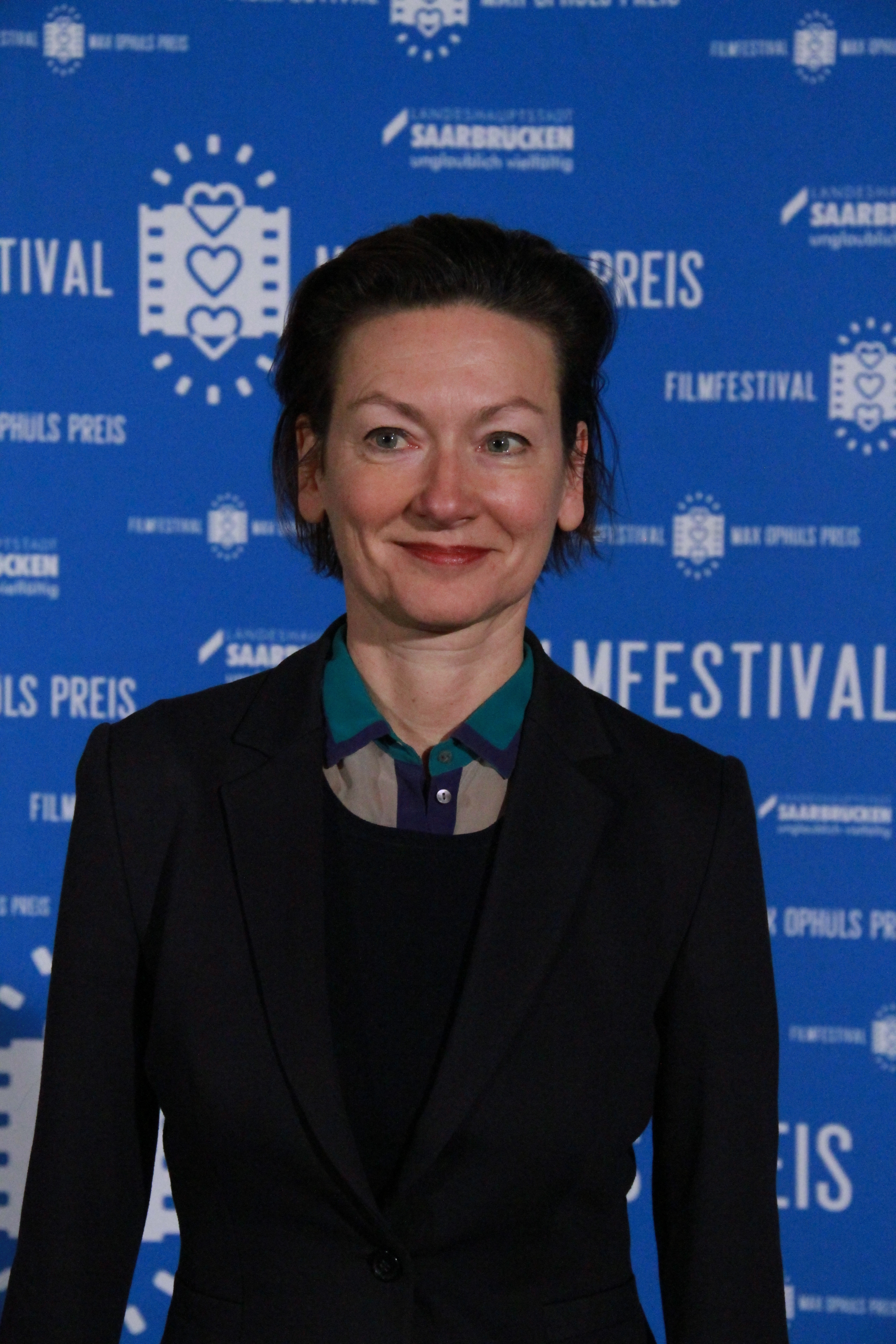 Martina Zöllner auf dem Max Ophüls Filmfestival 2015 (Doku-Jury